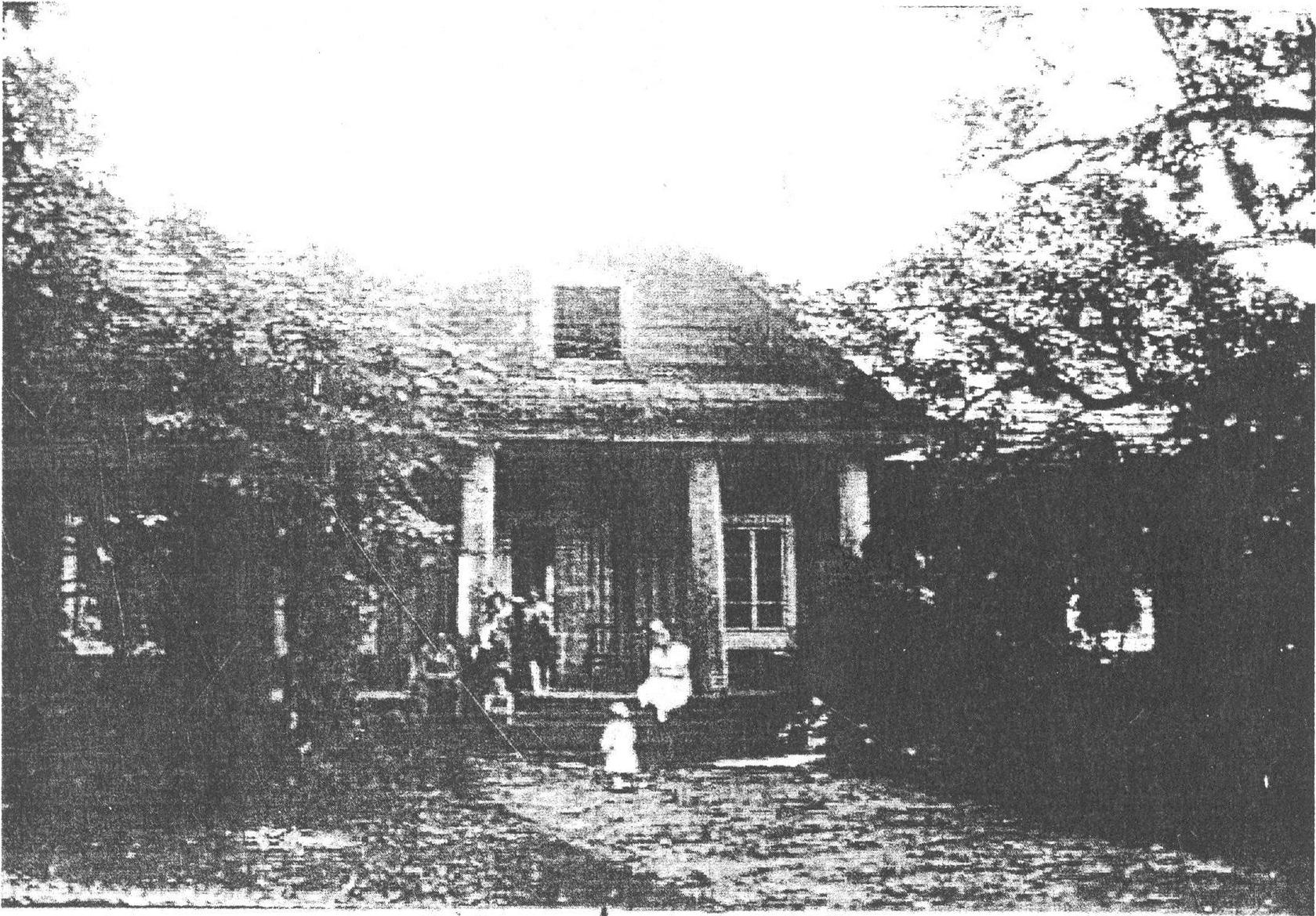 Беларуская (тарашкевіца): Юрацішкі (Juraciški), сядзіба Радкевічаў (Radkievič)